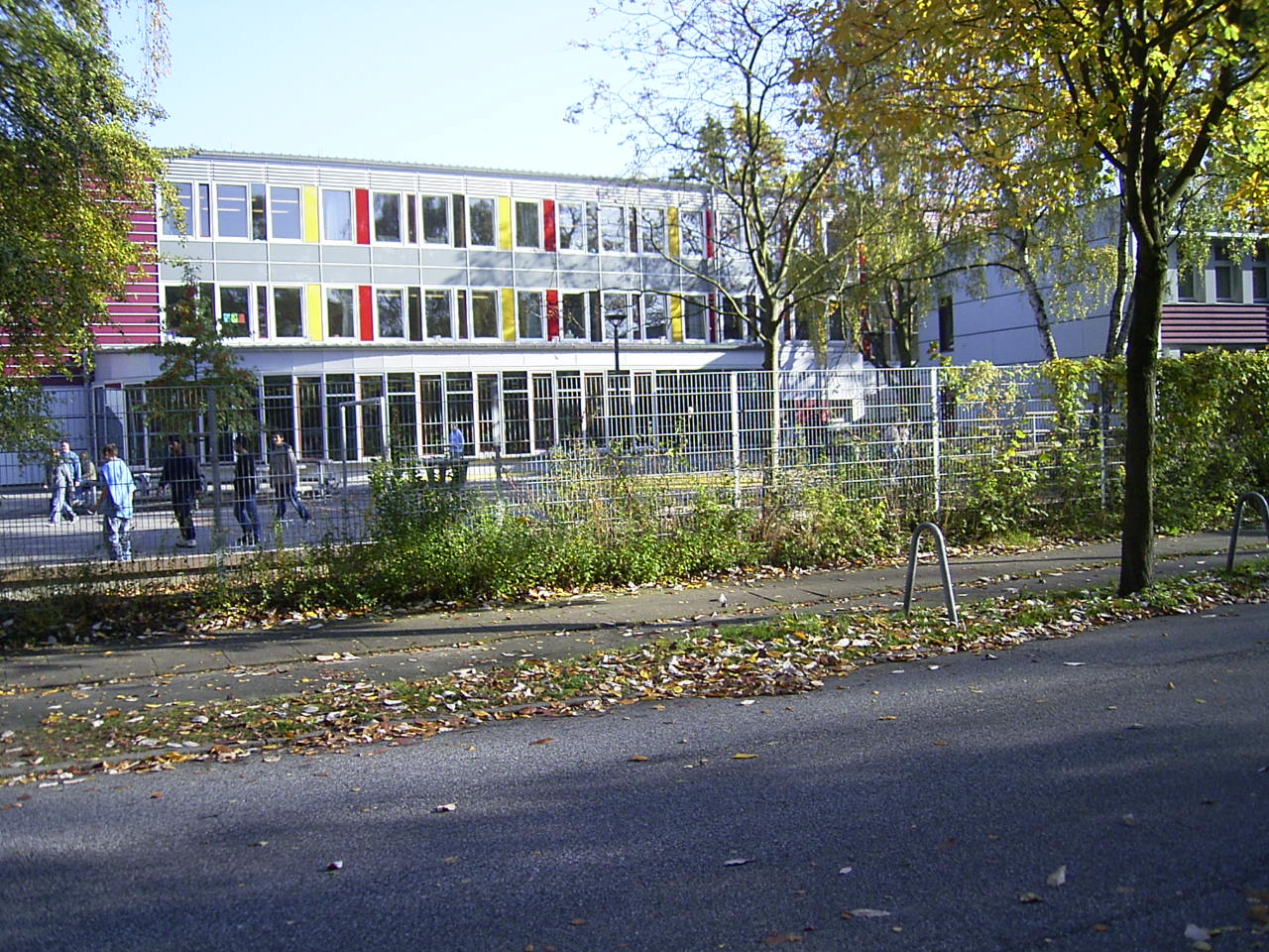 Kooperative Gesamtschule Benzenbergweg in Hamburg-Barmbek-Nord